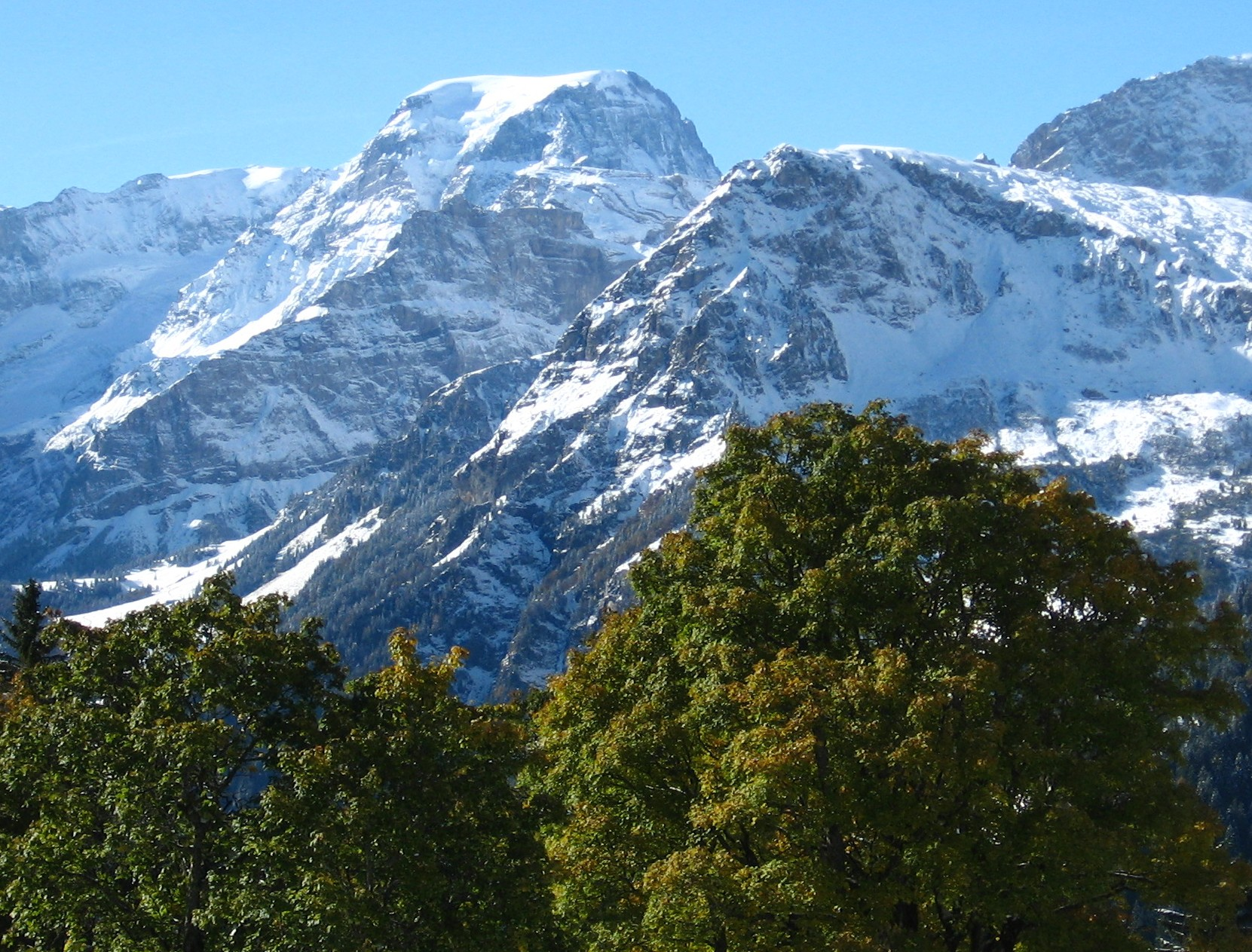 Tödi von Braunwald gesehen